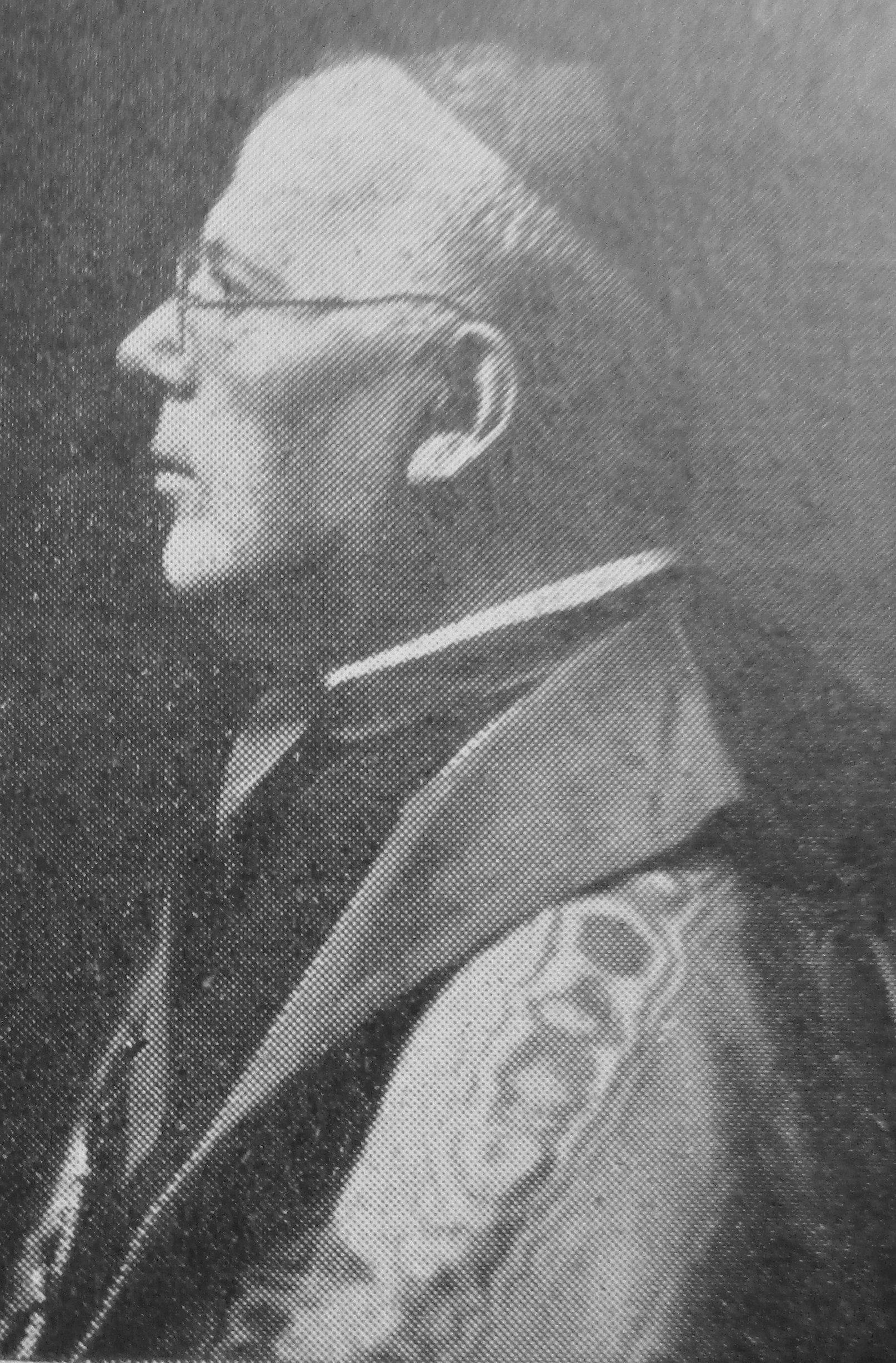 Photographie du cardinal Dolci parue dans le numéro hors série de février 1939 de L'Illustration consacré à la mort de Pie XI.